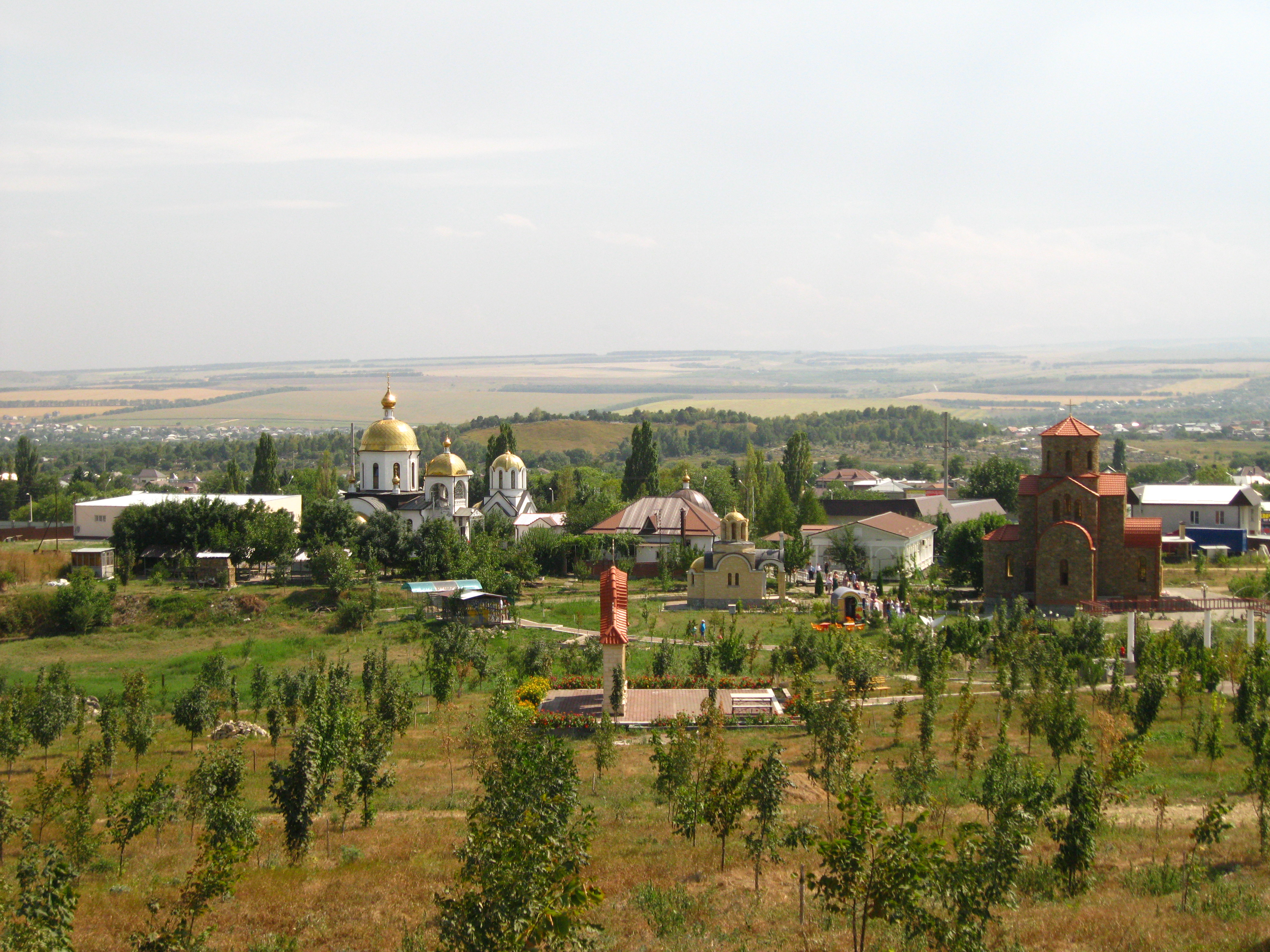 Петропавловский храмовый комплекс. Ессентуки, Ставропольский край, Россия